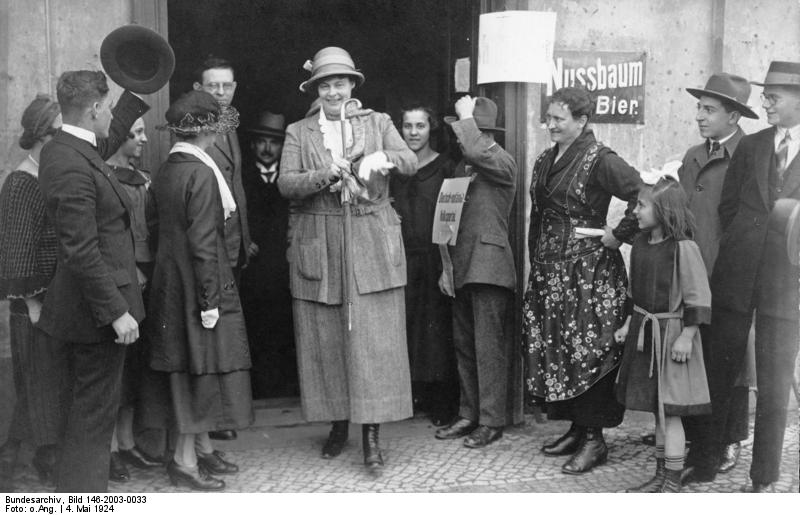 Reichstagswahlen, Samstag den 4. Mai 1924 Kronprinzessin Cäcilie vor dem Wahllokal in Oels.